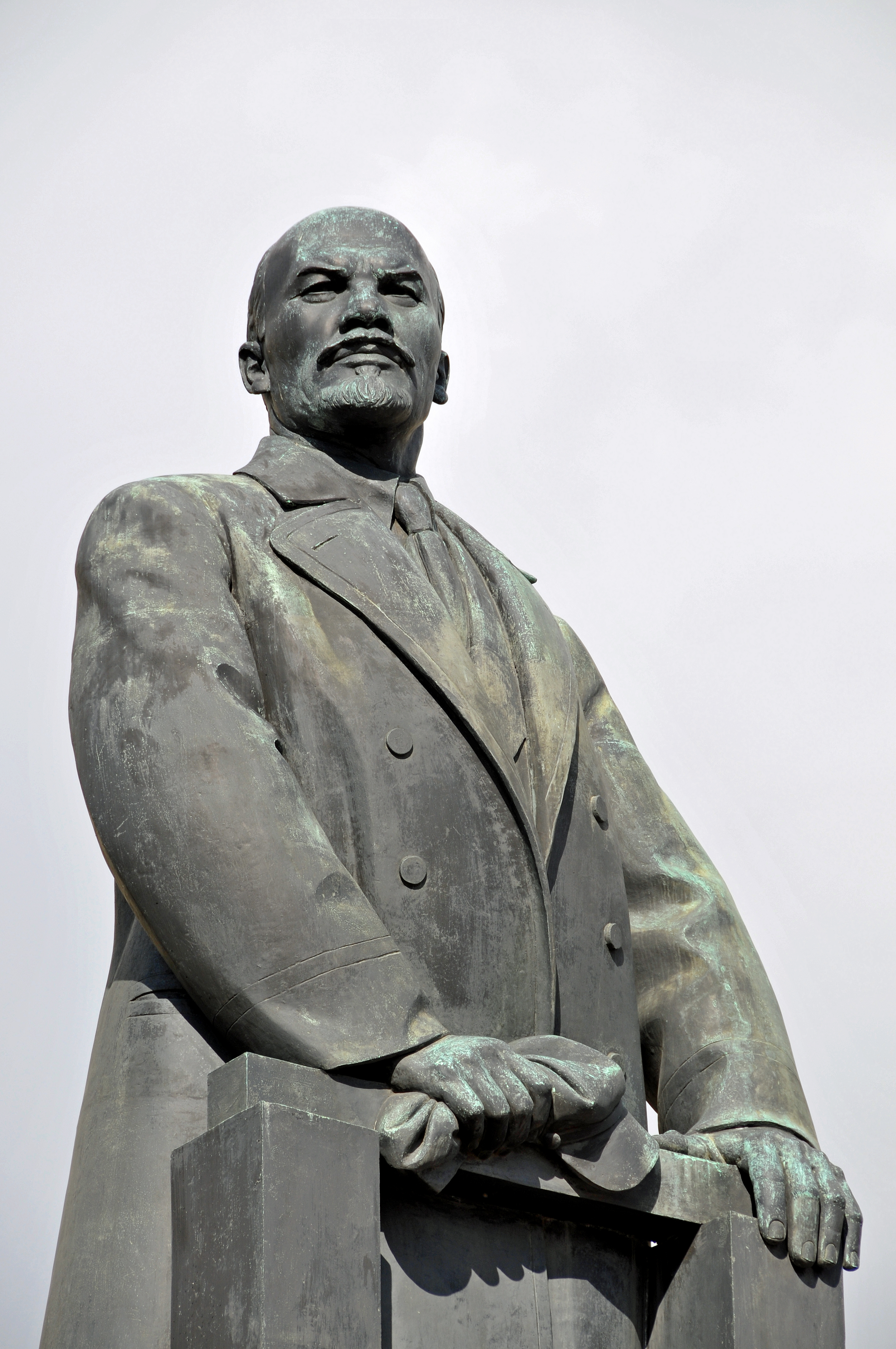 Помнік У.І.Леніну ў Мінску